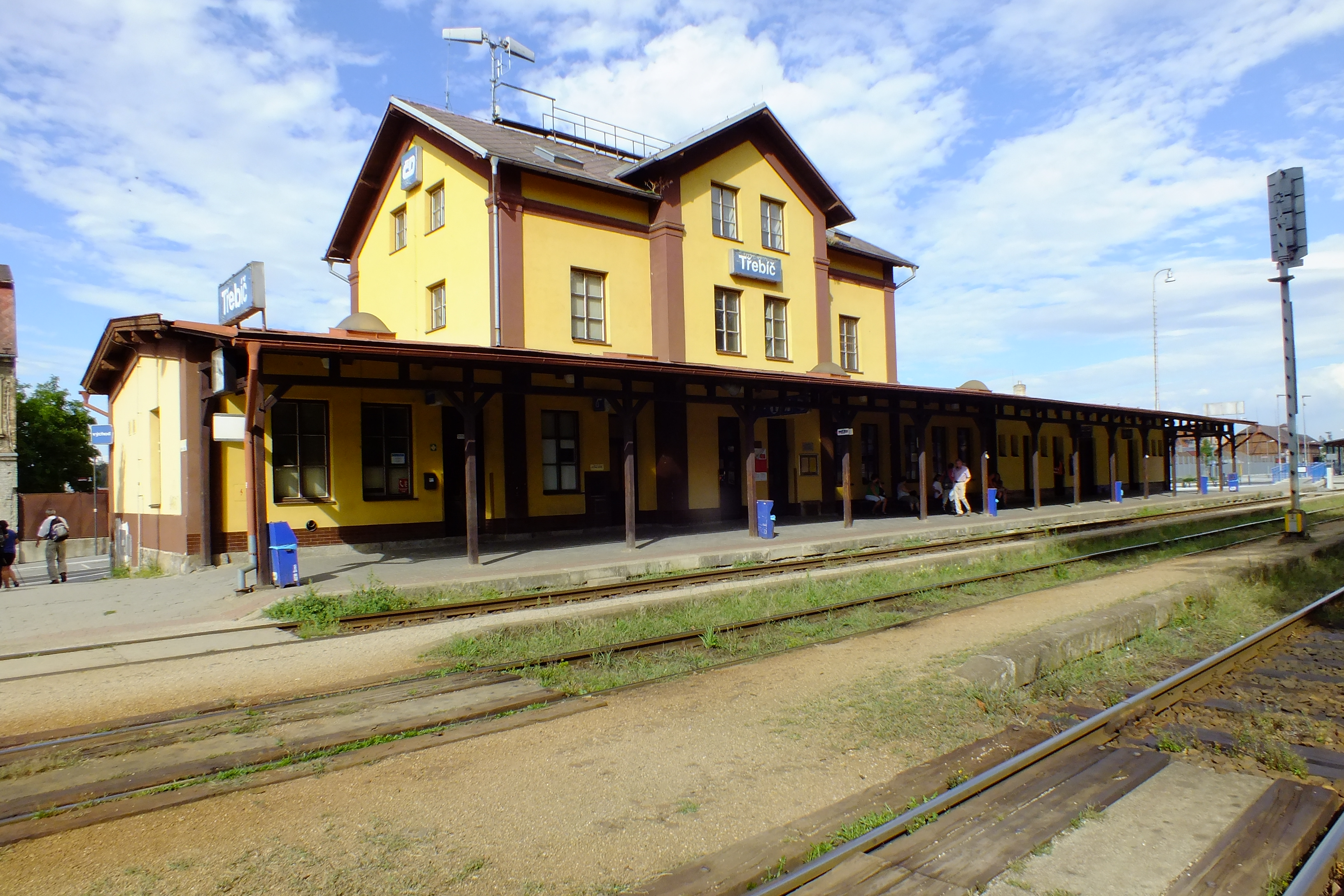 Staniční budova